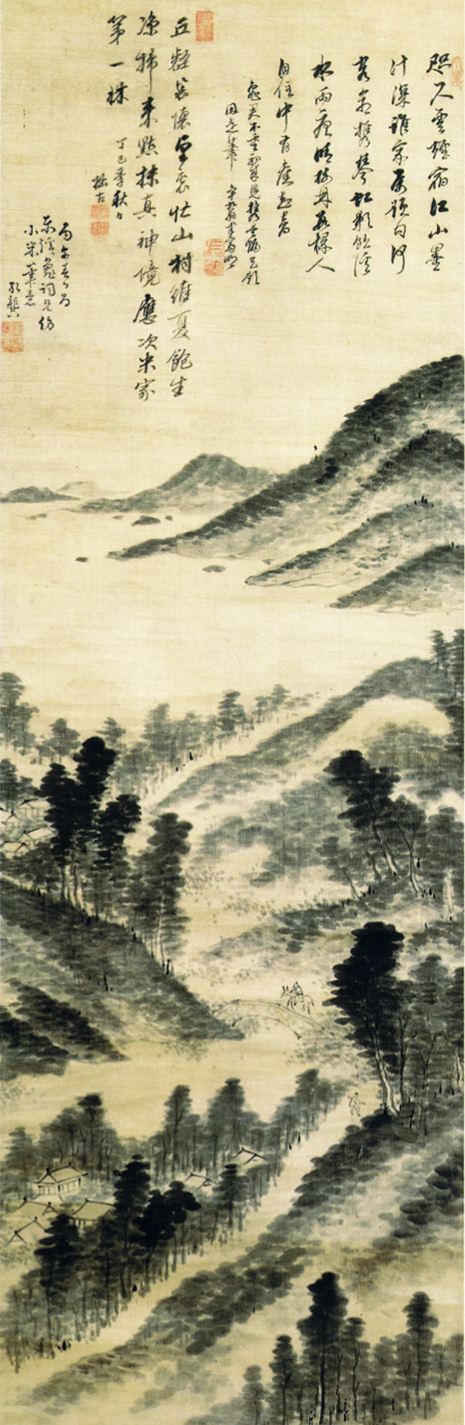 木村蒹葭堂「米法山水図」 関西大学所蔵